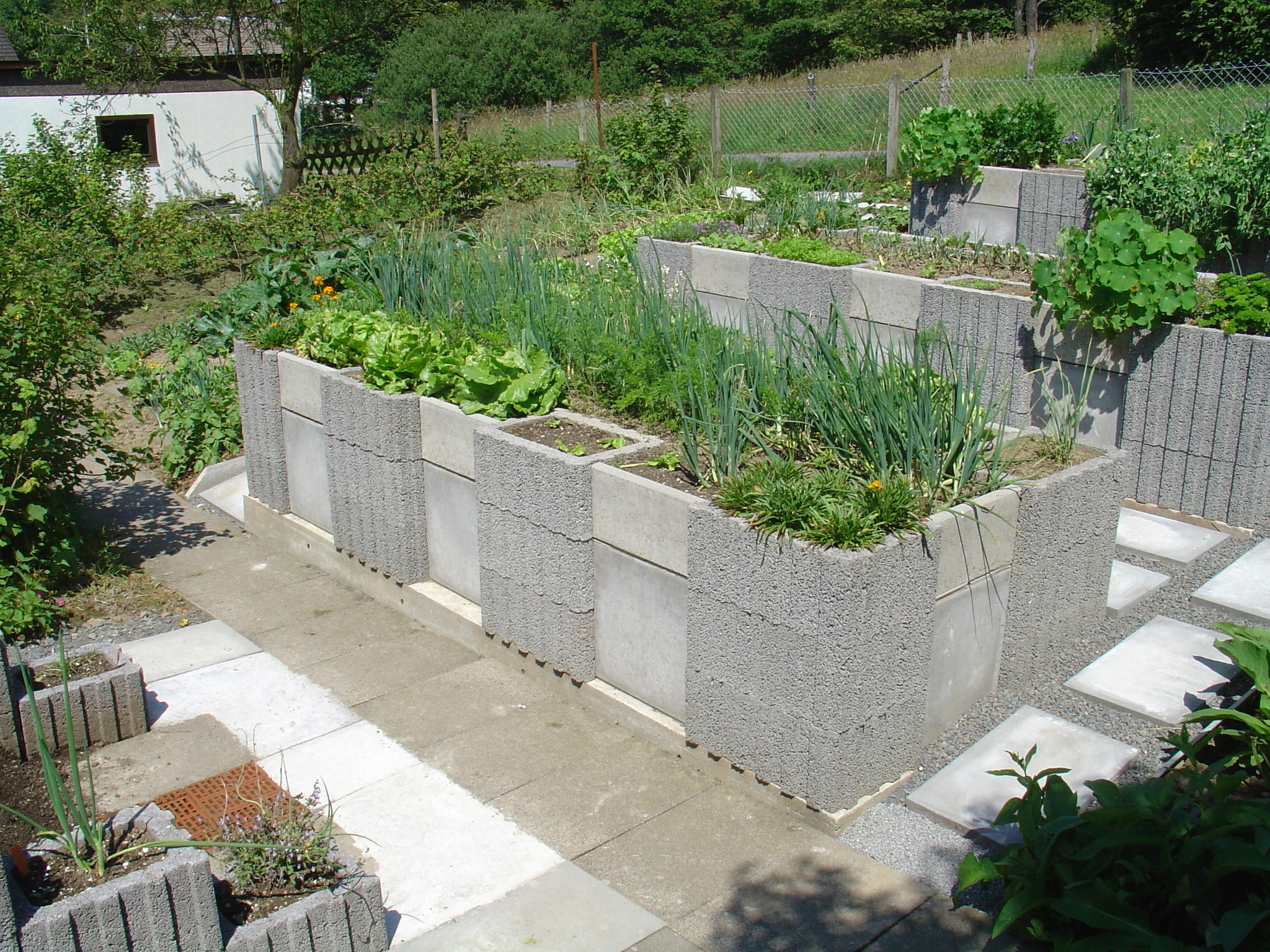 Hochbeet